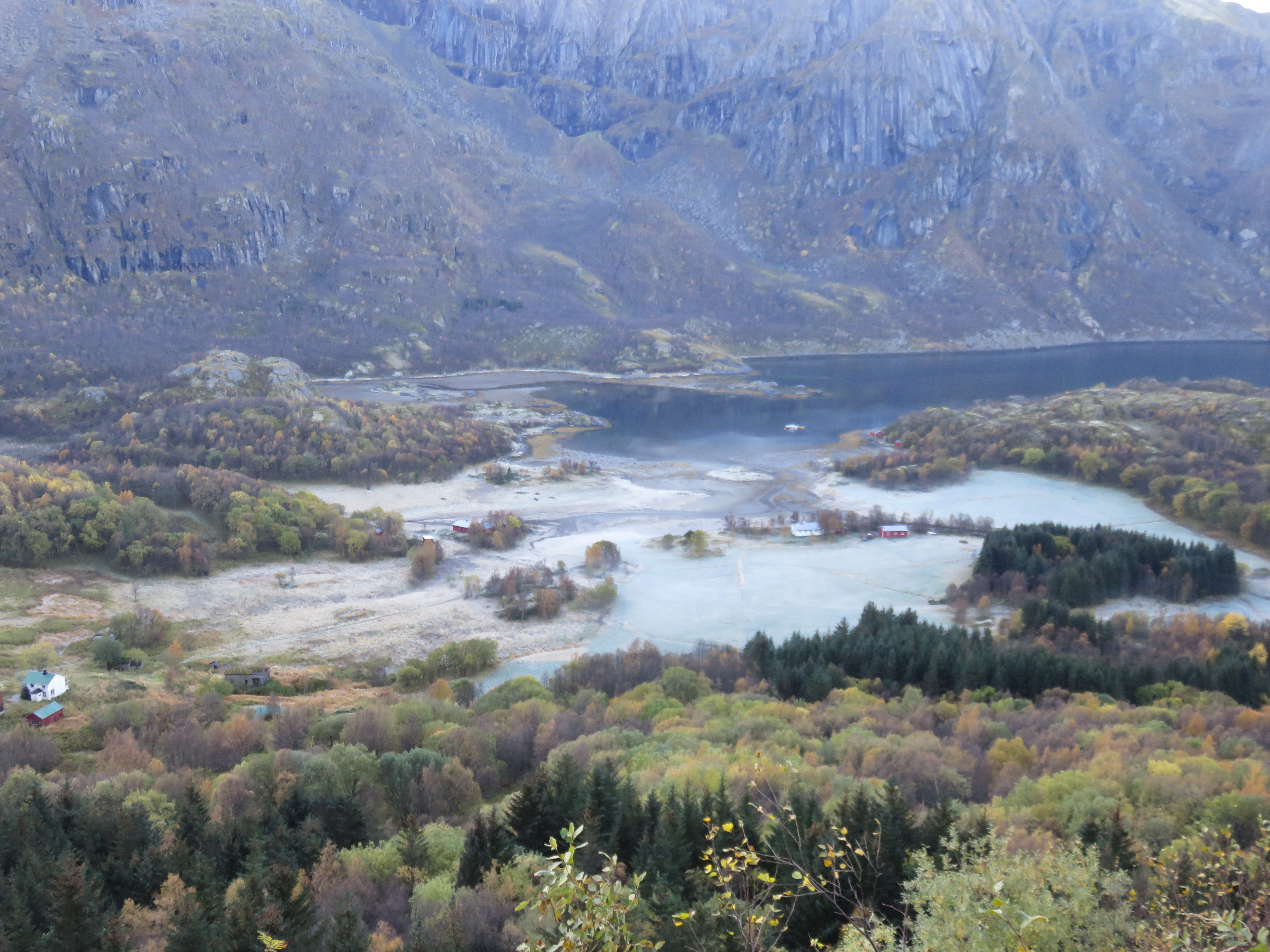 Sørdal, nord for Skutvik, i Hamarøy.